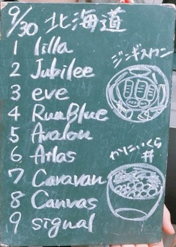 amiinAセトリボード(20180930(1))